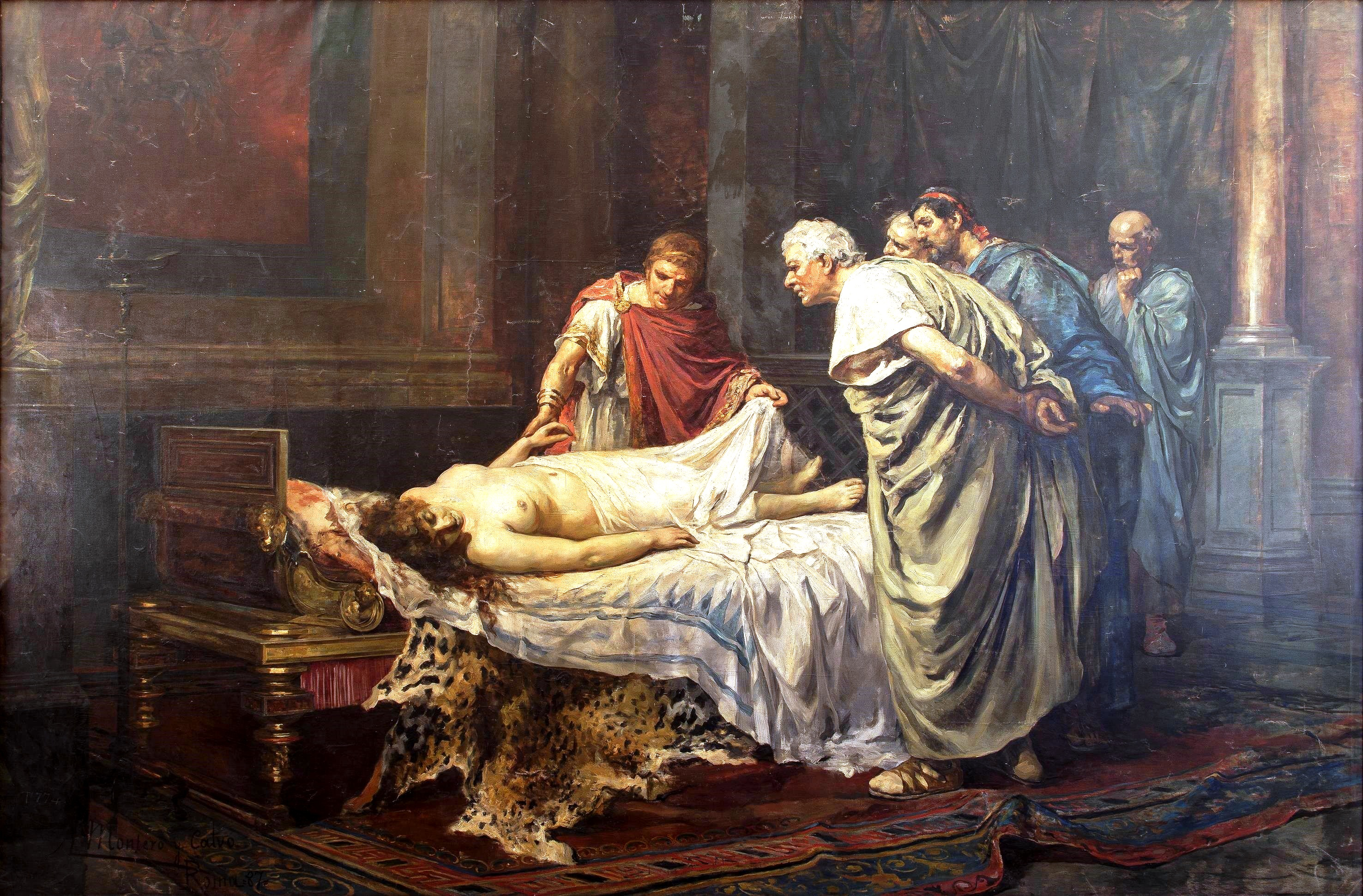 La obra representa el momento en que el emperador Nerón, que fue el último emperador de la dinastía Julia-Claudia, contempla, junto con otros personajes, el cadáver de su madre, Agripina la Menor, que fue asesinada por orden de su propio hijo en el año 59 después de Cristo.